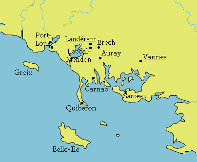 carte de la presqu'île de Quiberon